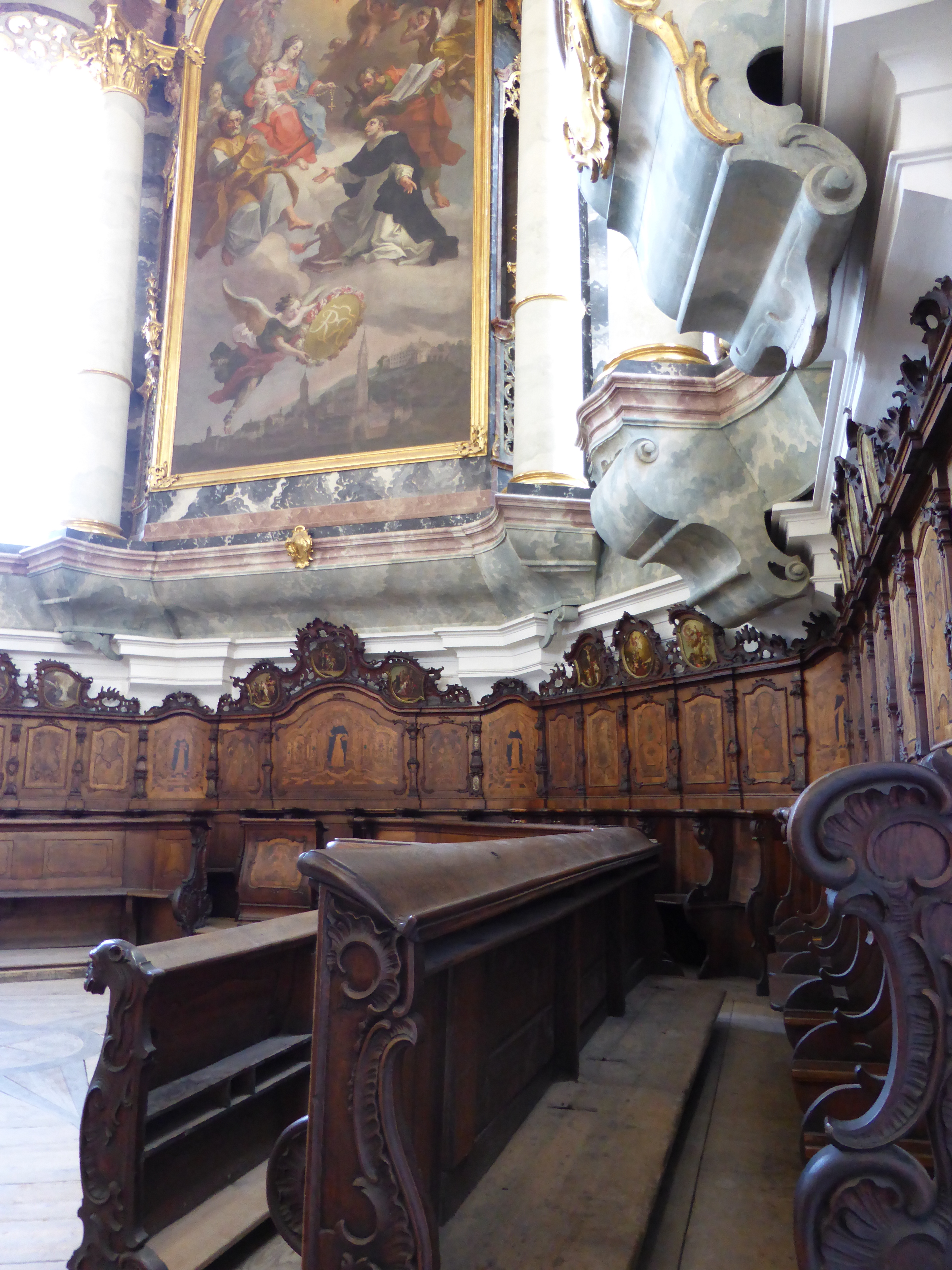 Chorgestühl Detail